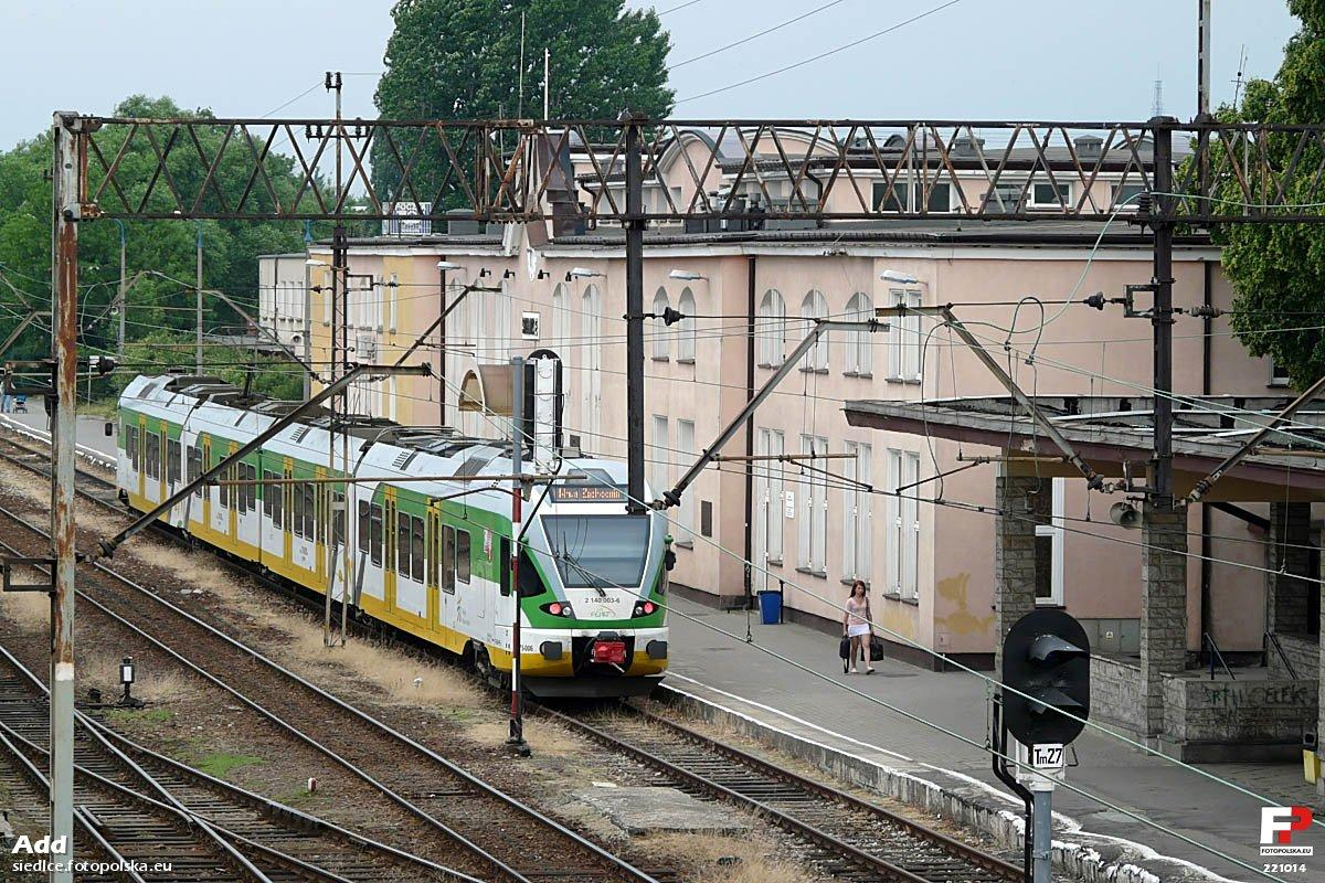 Siedlce. Dworzec kolejowy. Na torach FLIRT (niem. Flinker Leichter Innovativer Regional-Triebzug) Kolei Mazowieckich